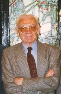 Scriitorul român Mircea Zaciu